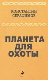 Обложка книги, выпущенной издательством Эксмоб 2003 год